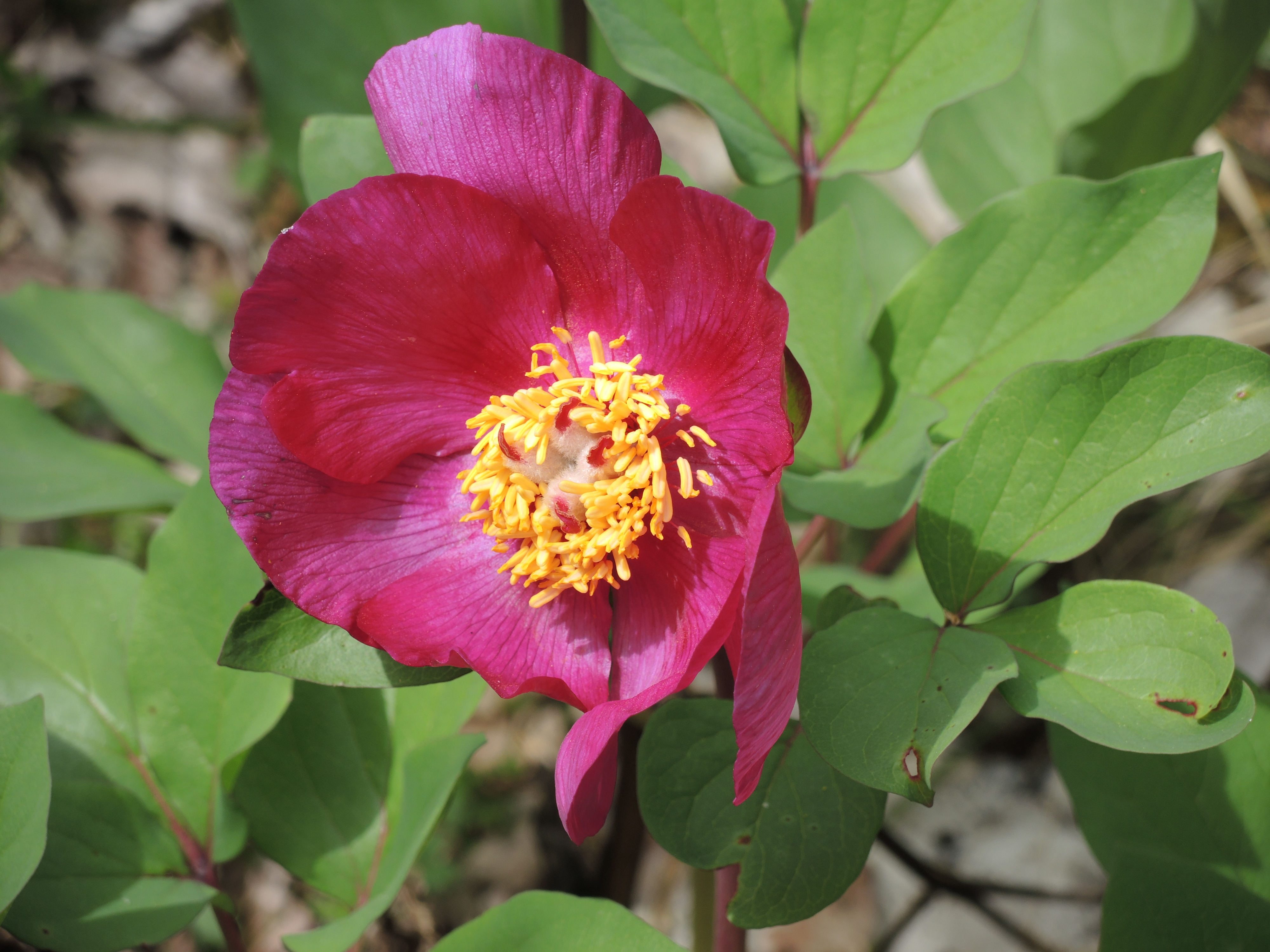 Elément rare de la flore de Cote d'Or